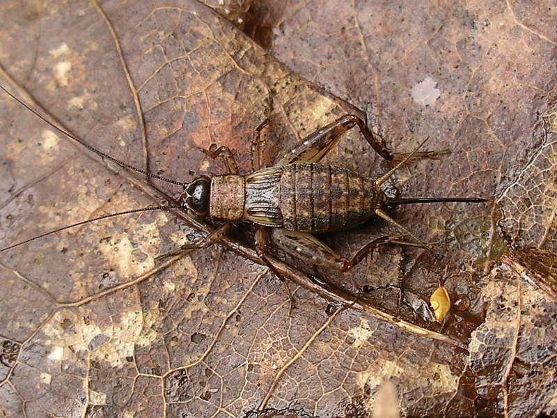 Boskrekel vrouw, Nemobius sylvestris